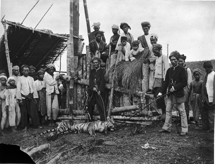 Foto. Groep mensen bij tijgerval met tijger te Soepajang, Padangse Bovenlanden, Sumatra`s Westkust